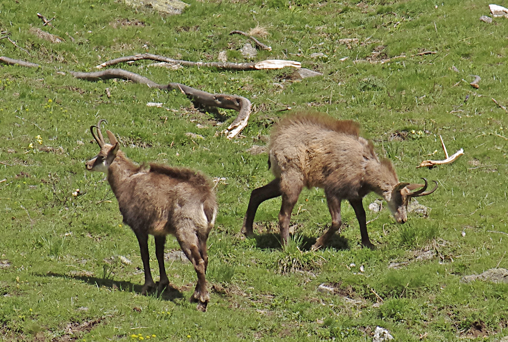 Le changement de pelage donne cet aspect de peau peu élégant au sortir de l'hiver